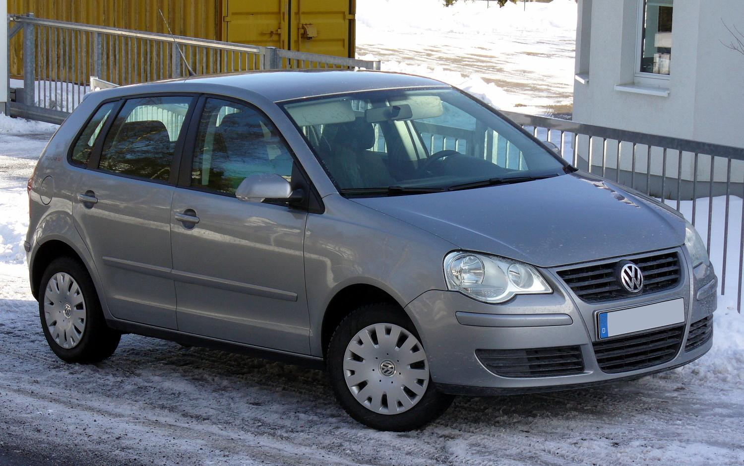 VW Polo IV Facelift